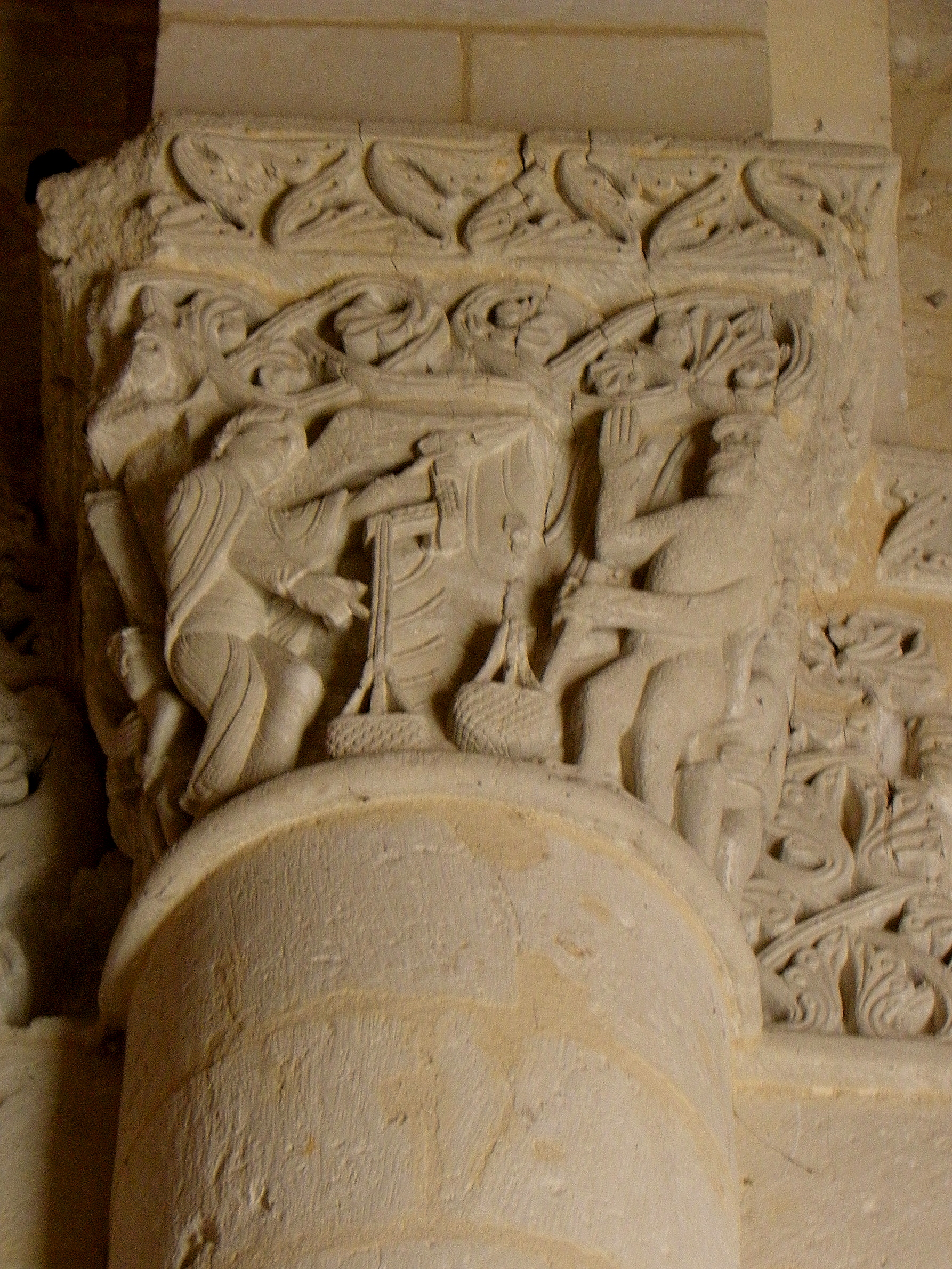 Chapiteaux de la basilique Saint-Eutrope de Saintes (17).